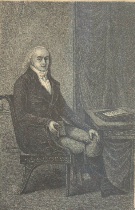 Portrait de François Chéron